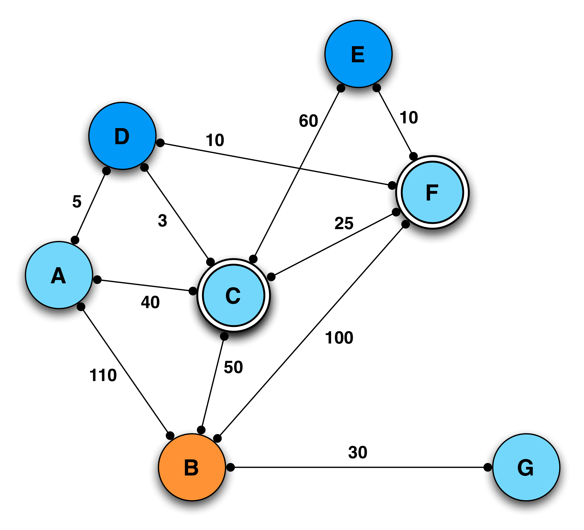 QoS - Algo OLSR modifié, version 3